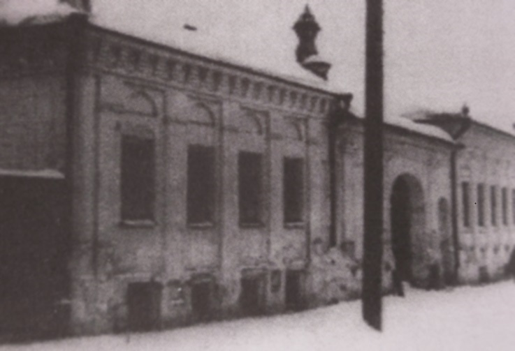 Дом Ноздриных